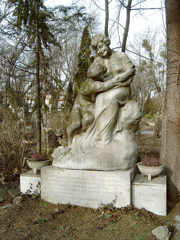 Góth Sándor (Pest, 1869. október 19. – Budapest, 1946. szeptember 7.) színész, rendező és műfordító és Kertész Ella; Góth Sándorné (Budapest, 1878. február – Budapest, 1936. június 24.) drámai színésznő sírja Budapesten. Farkasréti temető: 6. körönd-1-5. sírbolt [szobrász: Ligeti Miklós].